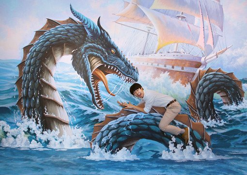 Музей оптических иллюзий Trick Eye в Пусане